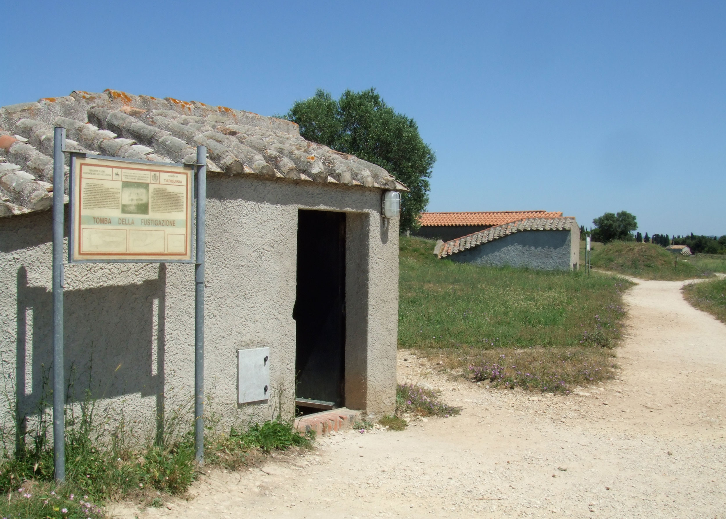 Entrée de la tombe de la Fustigation - nécropole de Monterozzi - Latium, Italie